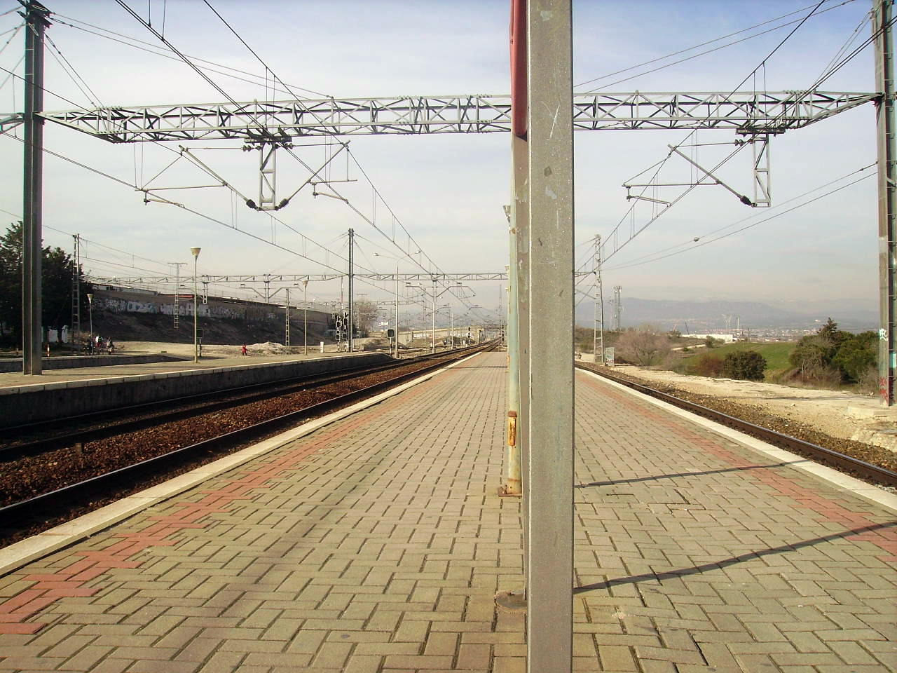 Uno de los andenes centrales de la estación